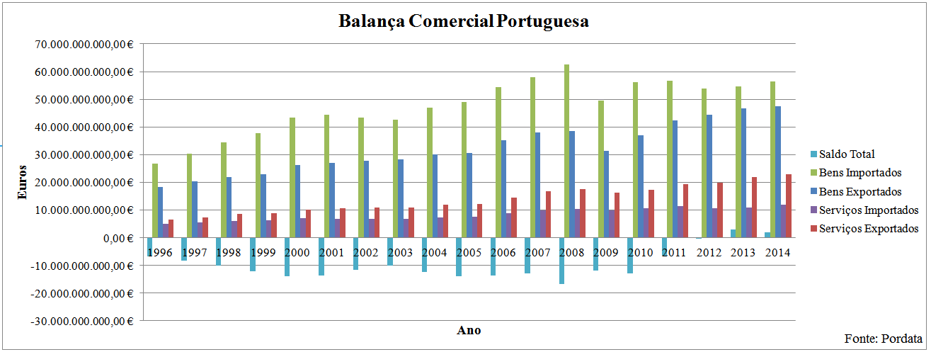 Balança Comercial Portuguesa, com a Pordata como fonte dos dados. 1996-2014, saldo, serviços e bens, exportações e importações e valores em euros.